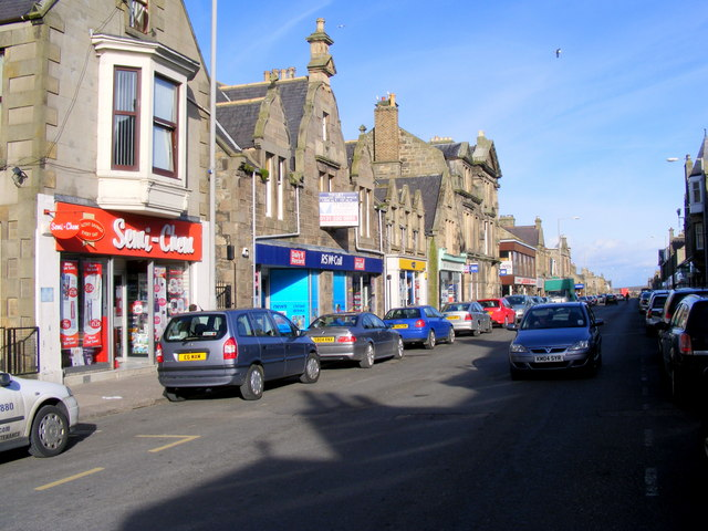 Buckie